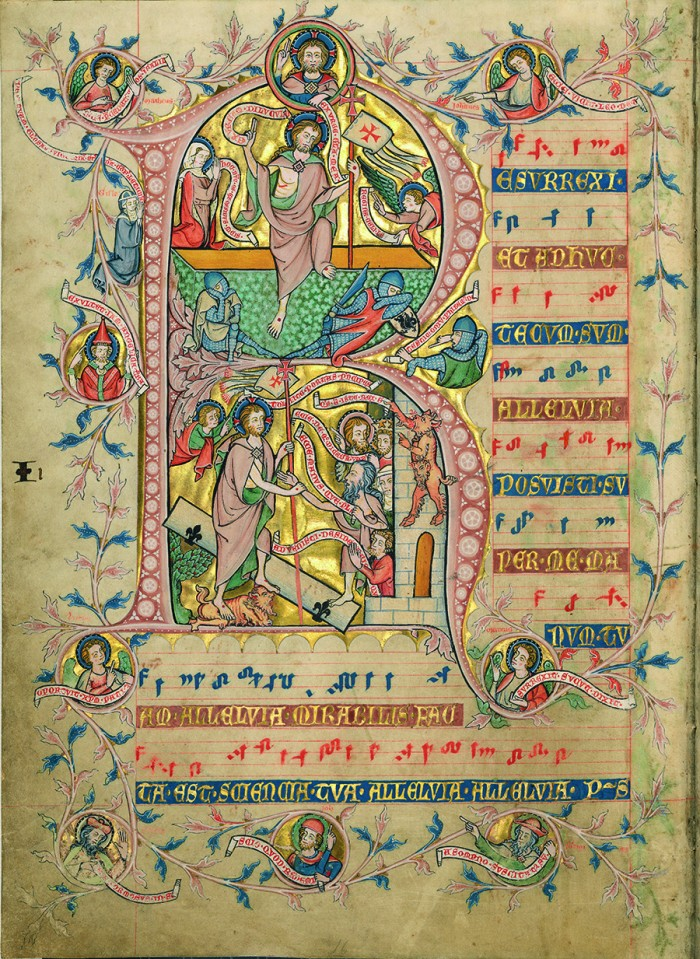 Codex Gisle: Osterantiphon Resurrexi et adhuc tecum sum